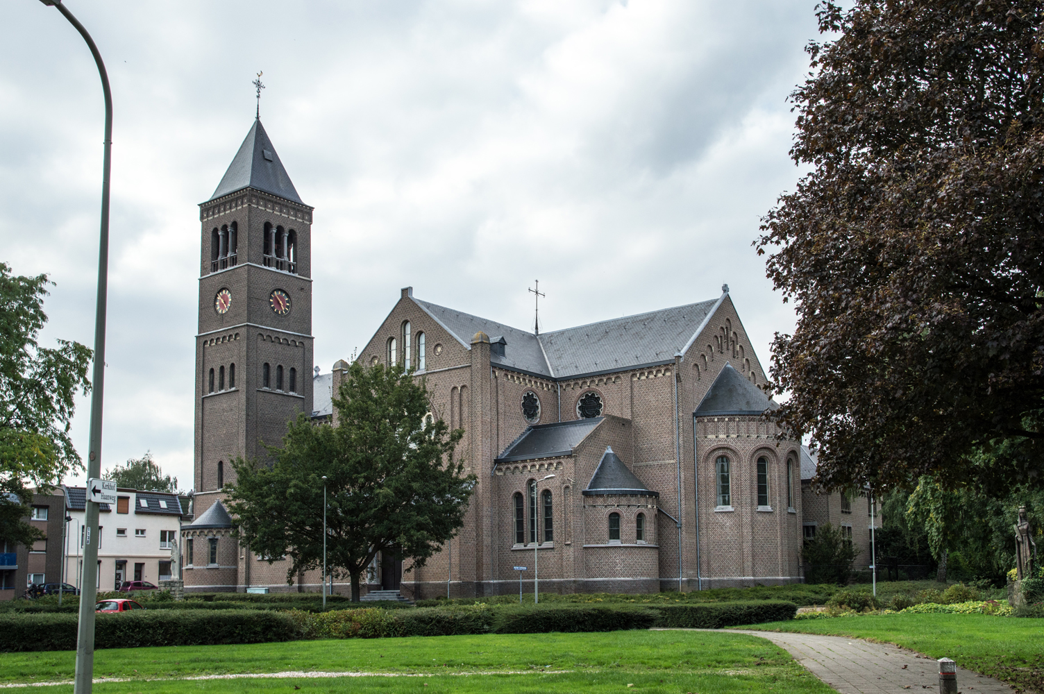 de kerk werd gebouwd in 1917 naar een ontwerp van architect J.H.H. Groenendael.